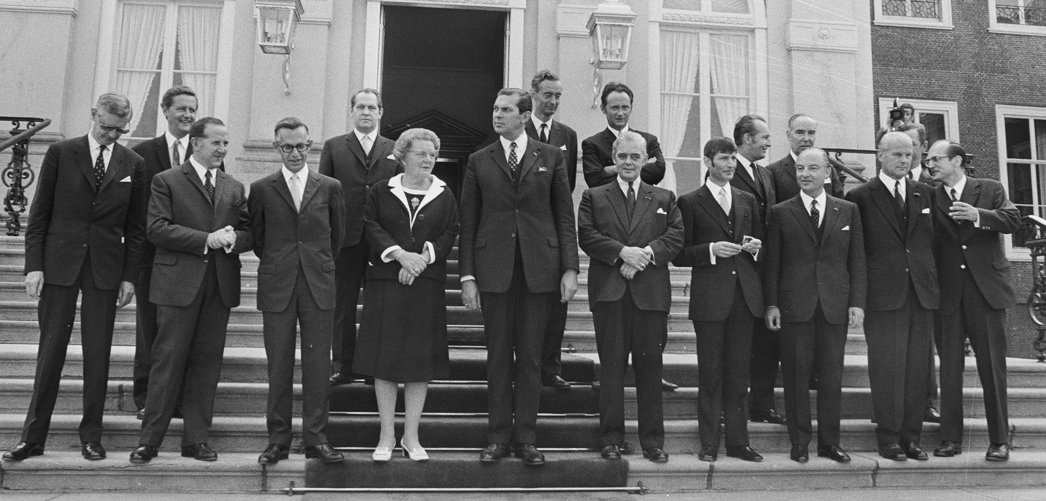 Beëdiging eerste kabinet Biesheuvel (1971-1972) op Paleis Huis ten Bosch. Vooraan op het bordes v.l.n.r: Udink, Van Veen, Nelissen, koningin Juliana, Biesheuvel, Geertsema, Van Agt, Schmelzer, De Koster en Drees. Op de achterste rij: Boertien, Lardinois, Langman, Boersma, Engels, Stuyt en laatste persoon onbekend. Den Haag, 6 juli 1971.